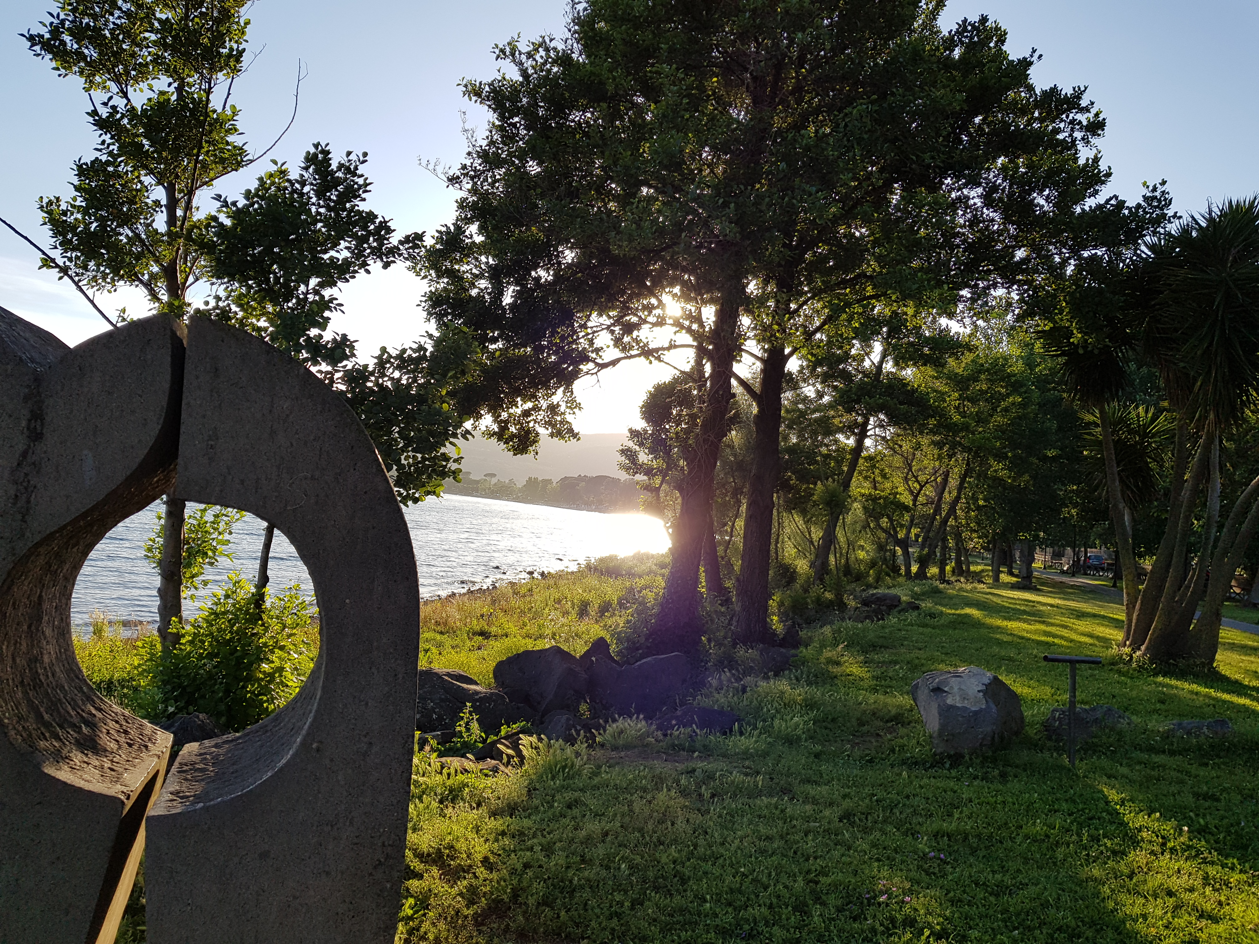 Giardini pubblici sul lungolago.